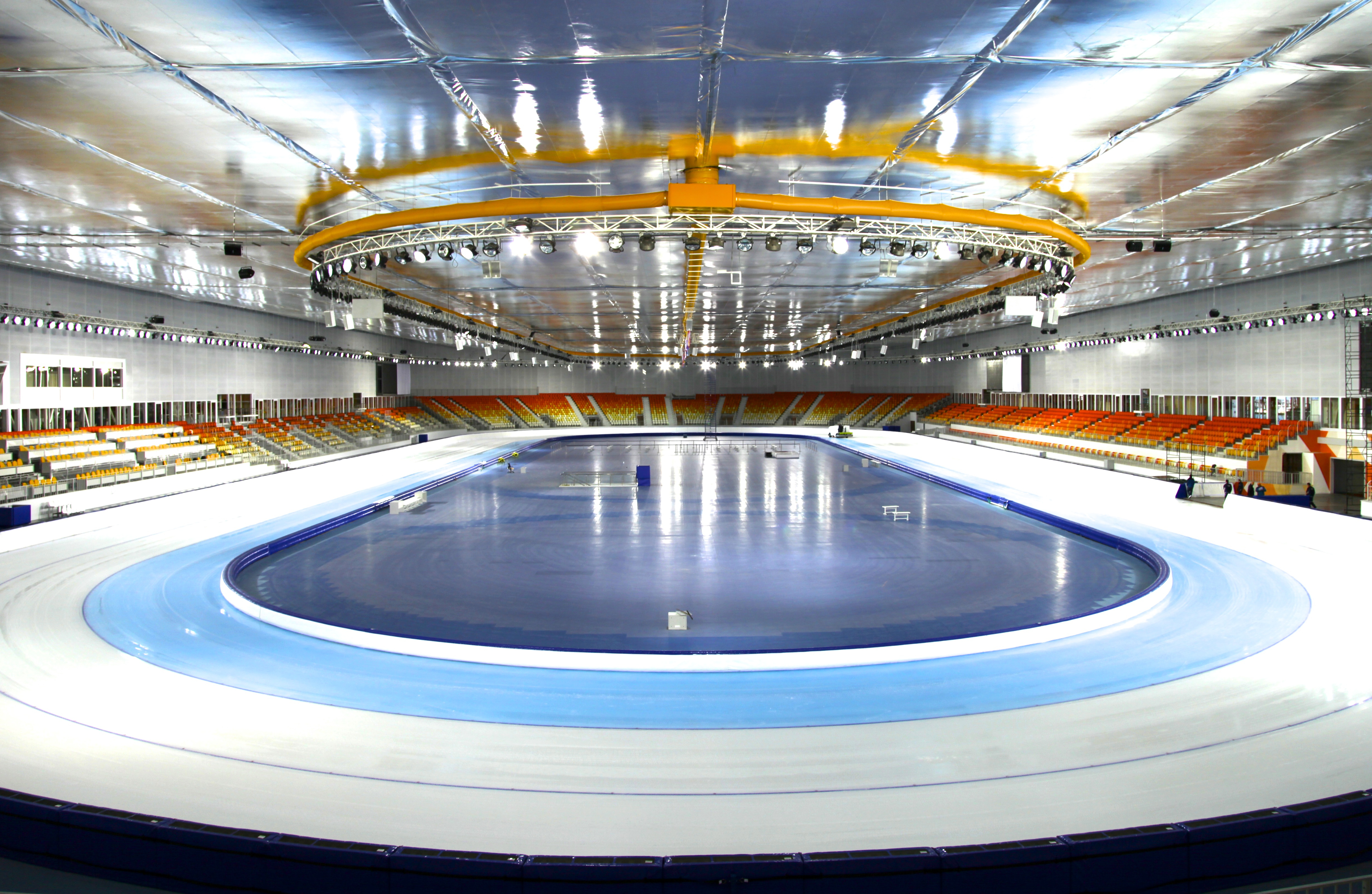 Крытый конькобежный центр Адлер Арена. Собственник объекта ОАО "Центр "Омега"